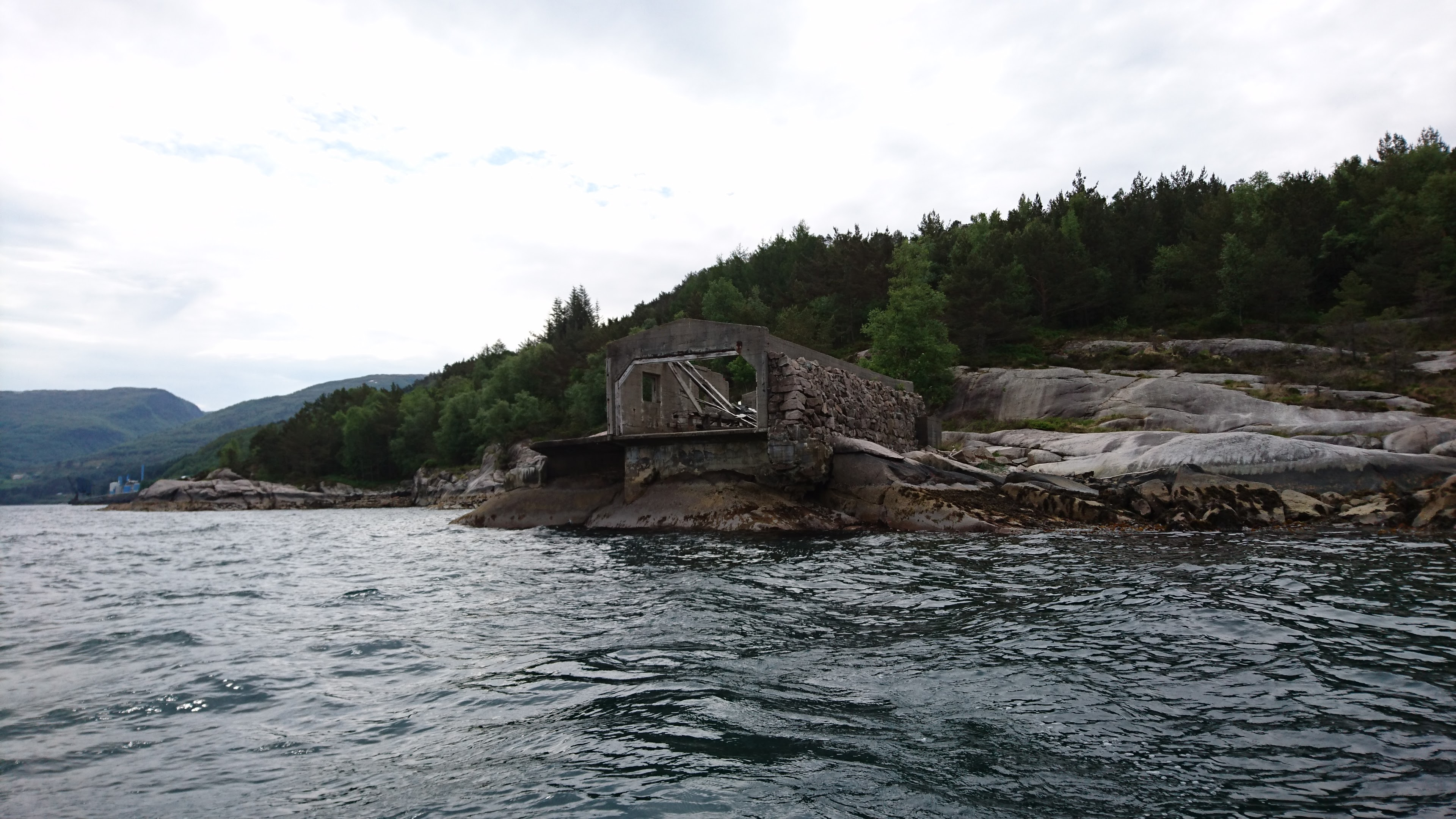 Rutledal Torpedobatteri i Sognefjorden